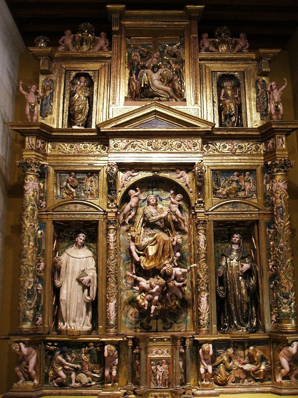 Museo de Burgos, Retablo de la Asunción, de Pedro López de Gámiz (1581), procedente del Monasterio de Santa María la Real de Vileña